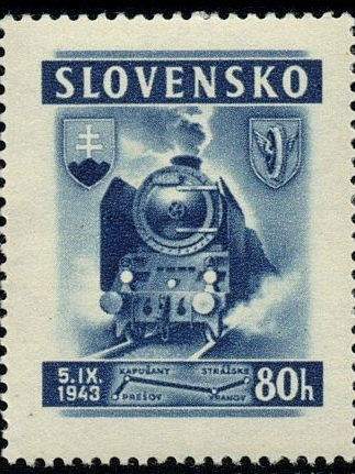 Poštová známka . Otvorenie železničnej trate Prešov – Kapušany – Vranov – Strážske 5.9.1943. Slovensko.